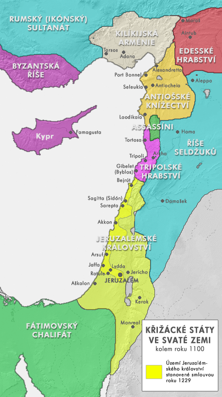 Křižácké státy ve Svaté zemi kolem roku cs:1100.